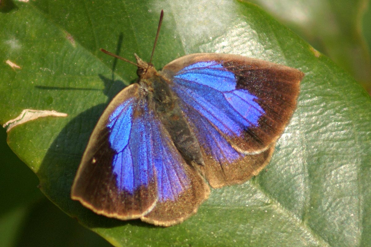 Narathura japonica